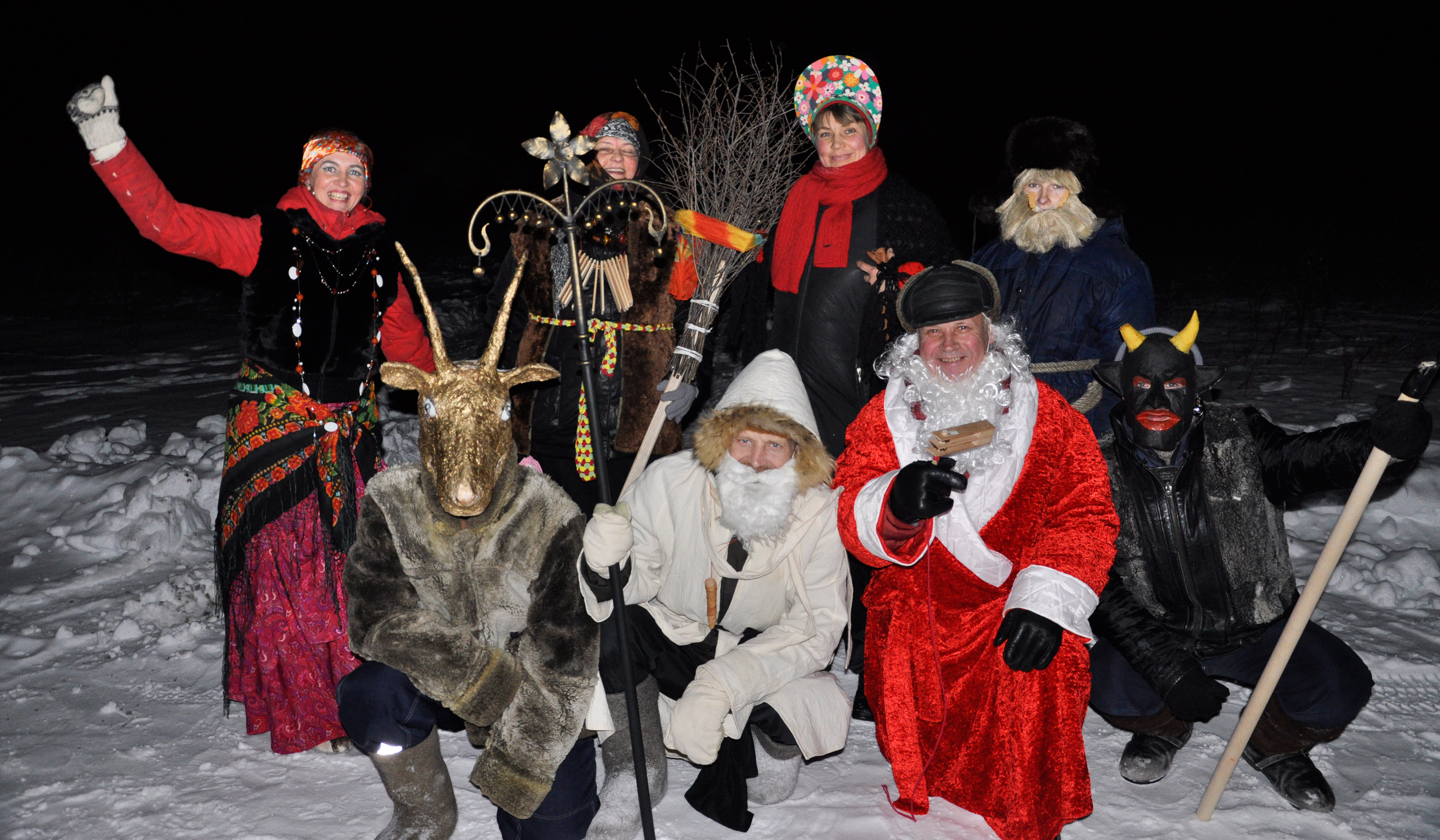 Группа колядовщиков. Колядки в родовом экопоселениии «Кореньские родники». Белгородская область, Россия, декабрь 2012 г.